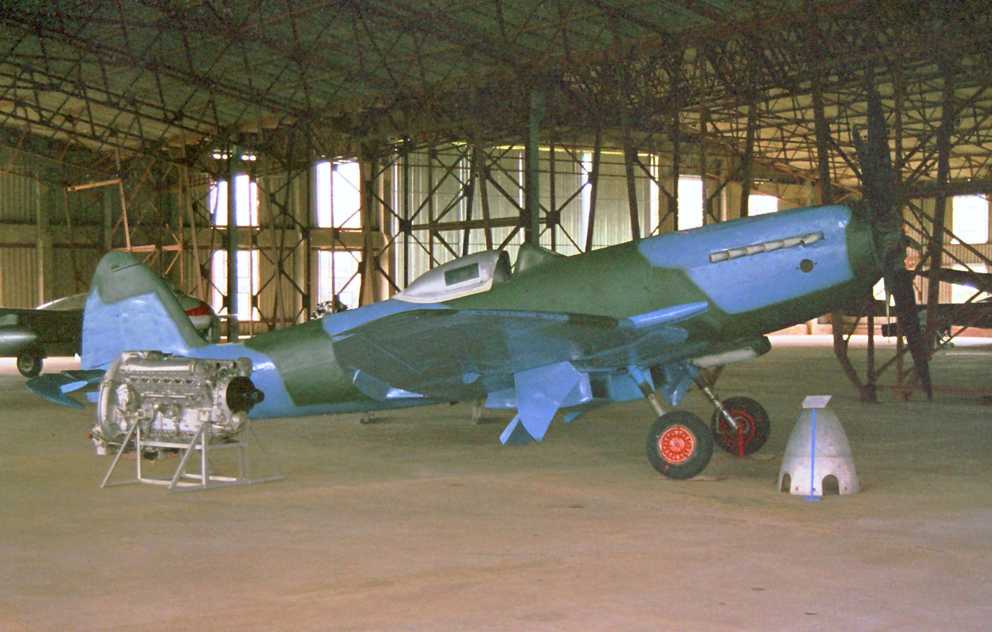 PK355 Supermarine Spitfire F.22